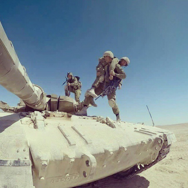 פנוי פצועים מטנק